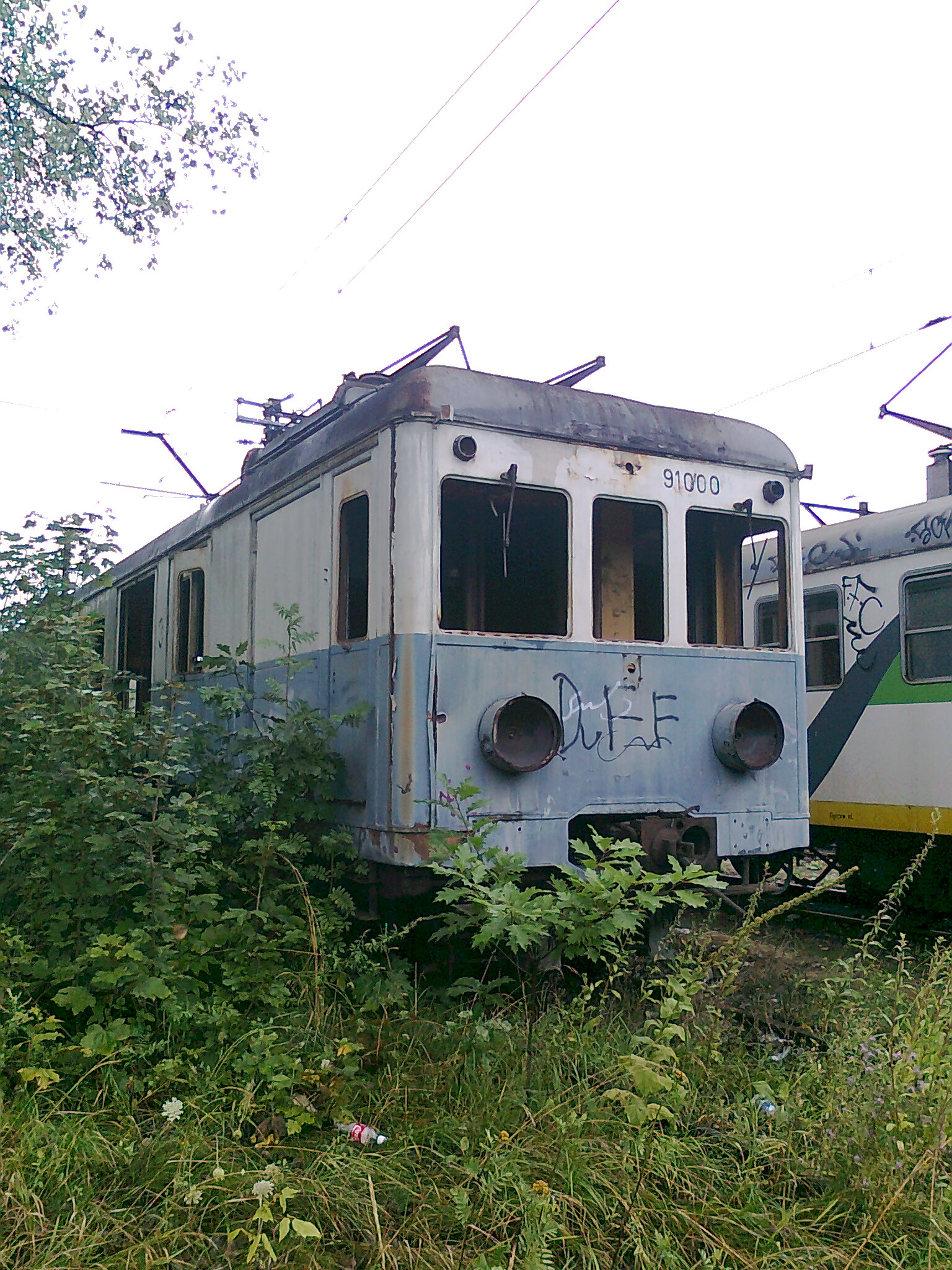 91000 (EW51) stoi w krzakach na Olszynce Grochowskiej